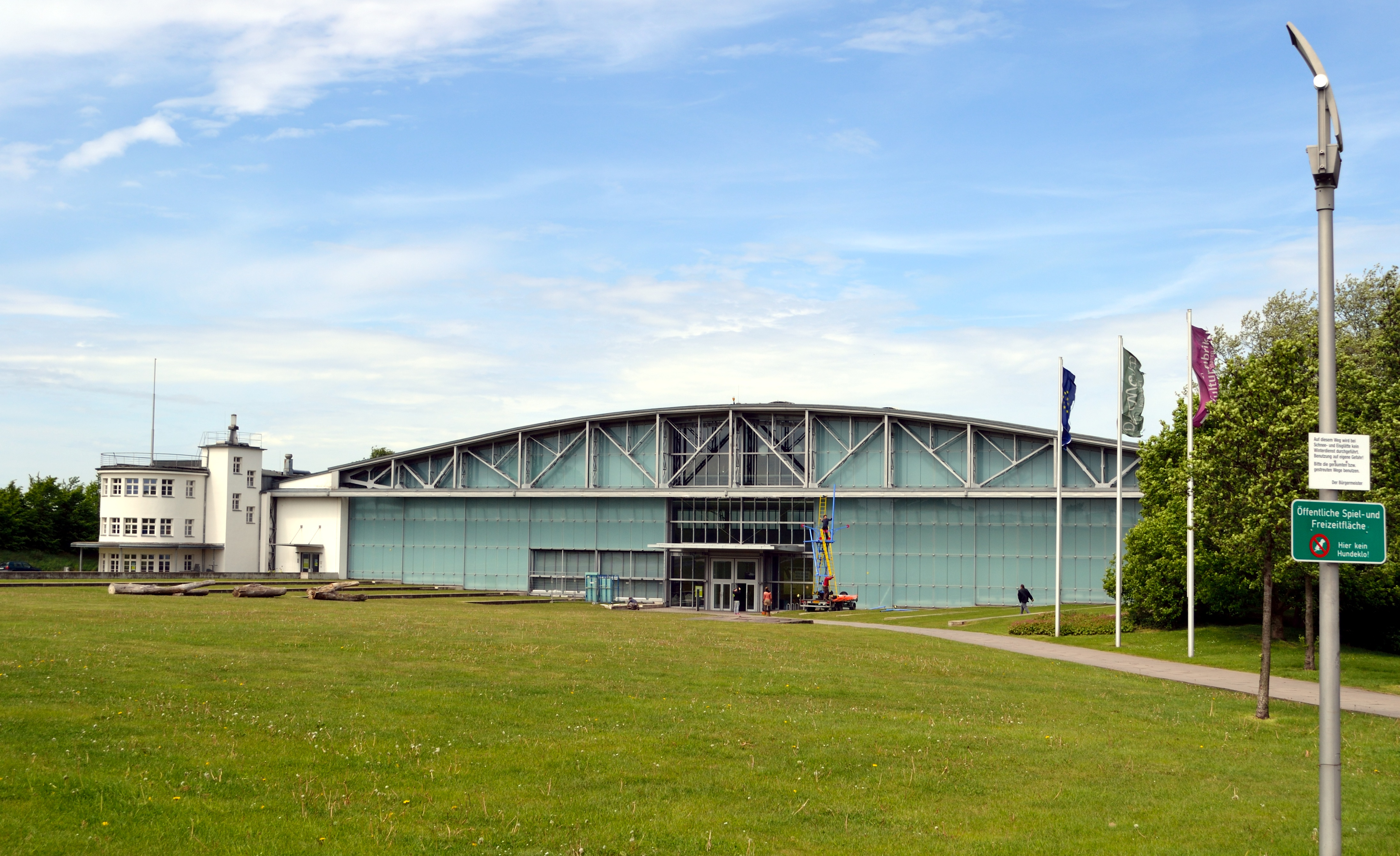 Teil des ehemaligen Fliegerhorst Detmold, Block 22: Flugzeughalle (vormals Art Kite Museum, heute Mehrzweckhalle "Hangar 21") This is a photograph of an architectural monument.